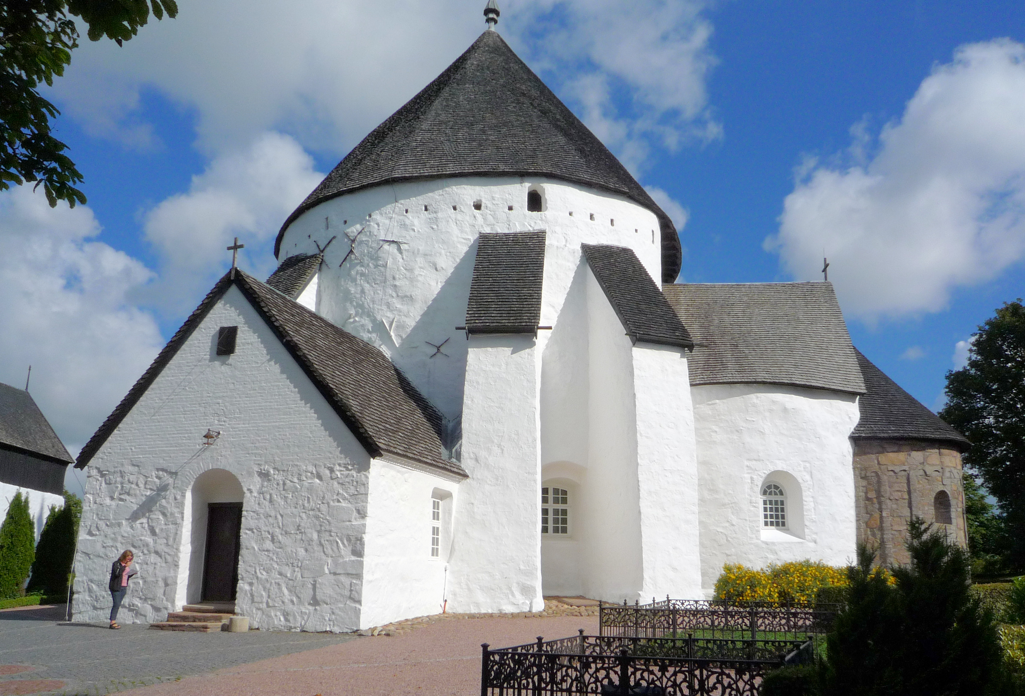 Østerlars Kirke on Bornholm, Denmark From south.